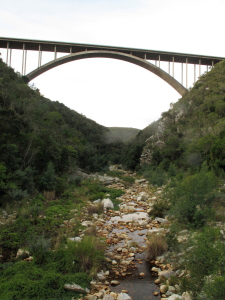 Van Stadens Bridge